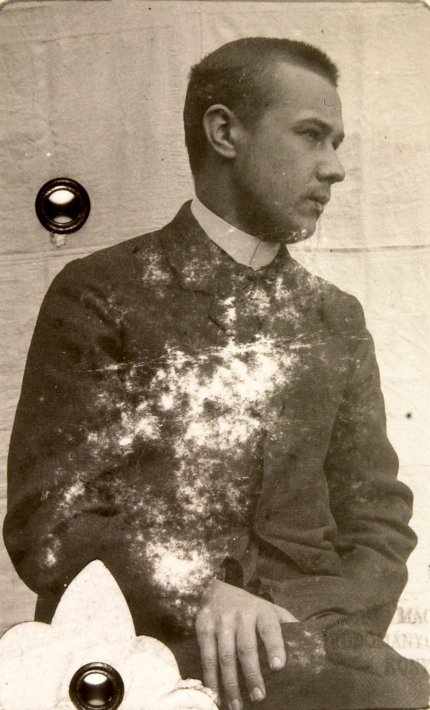 Kosztolányi Dezső egyetemi indexének fotója